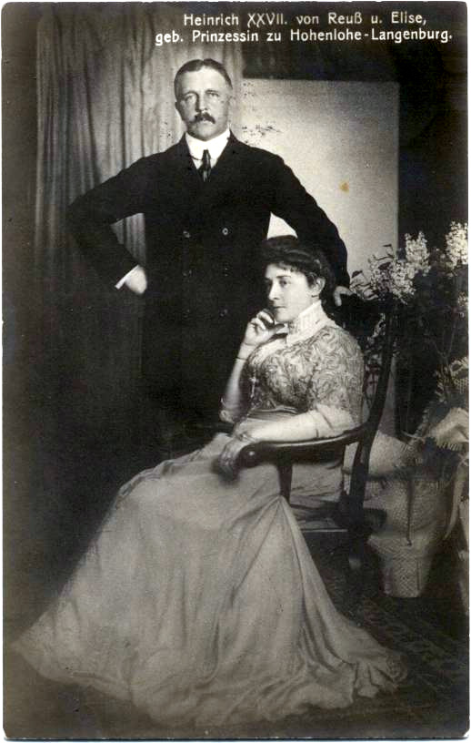 Fürst Heinrich XXVII. Reuß jüngere Linie mit seiner Frau Elise, geb. Prinzessin zu Hohenlohe-Langenburg